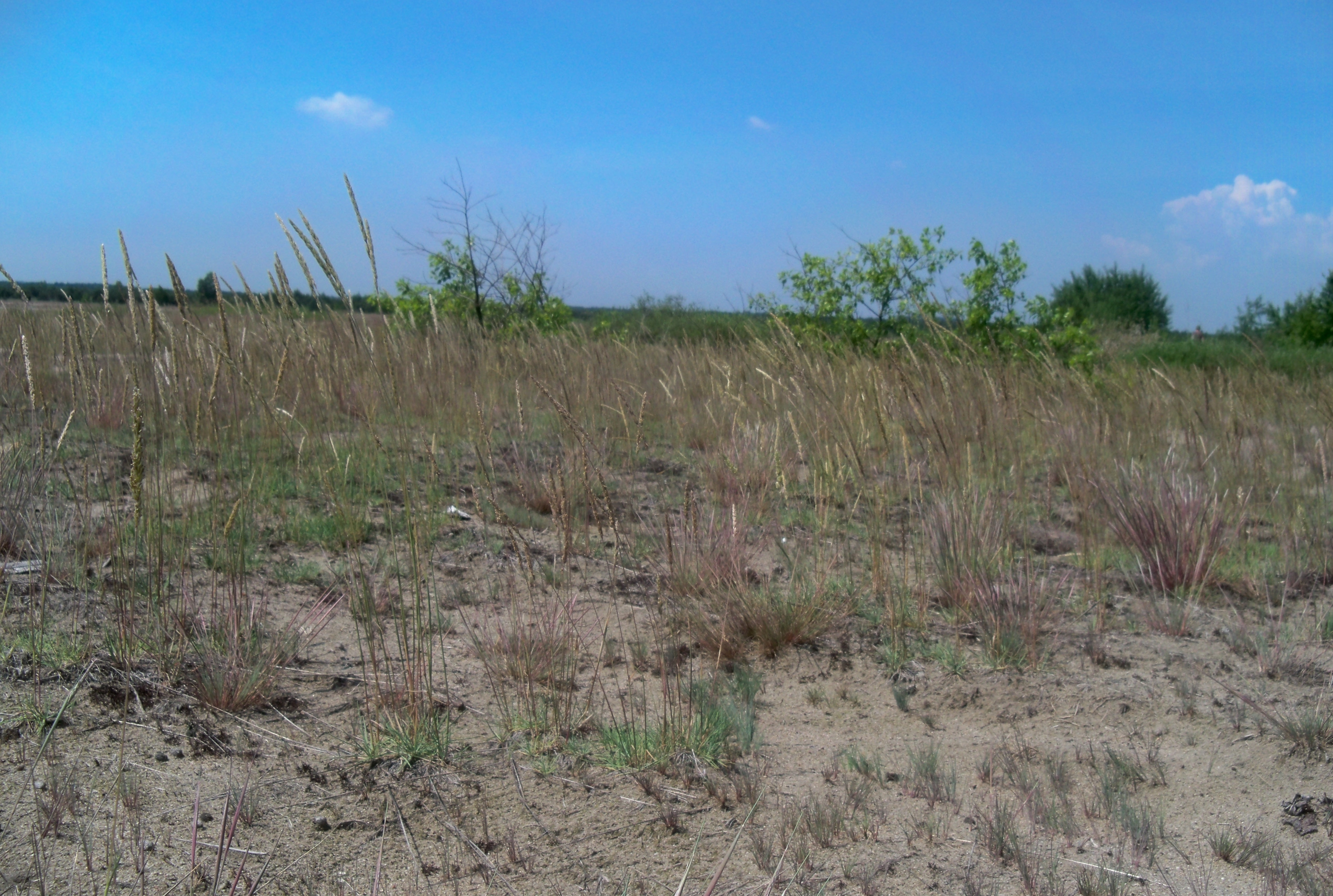 Śródlądowa murawa napiaskowa Koelerion glaucae w postaci ubogiej florystycznie na Pustyni Błędowskiej